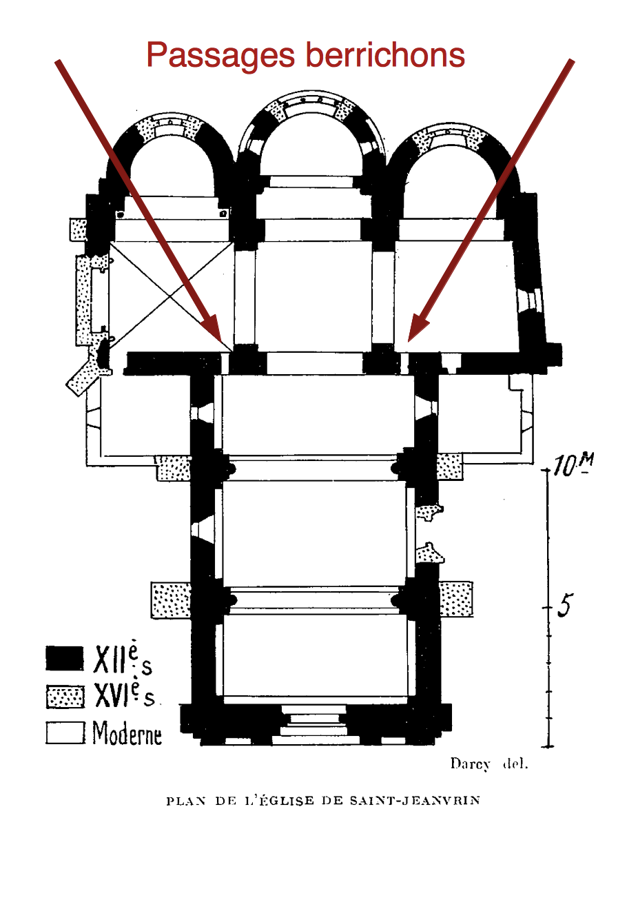 Ce plan de l'église Saint-Georges de la communede Saint-Jeanvrin est extrait du livre de Deshoulières disponible sous Gallica. Il est agrémenté de deux flèches indiquant les passages berrichons